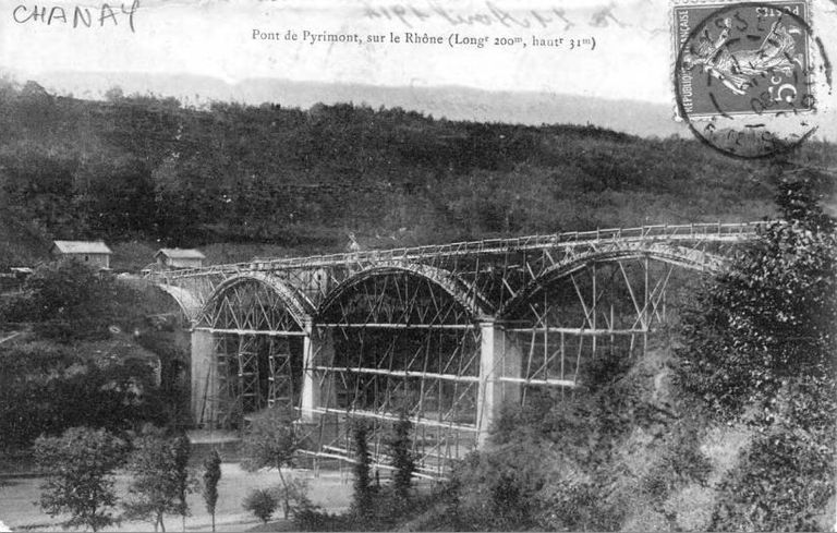 Carte postale représentant la construction du premier pont de Pyrimont (ou viaduc de Pyrimont) en 1905. Construit de 1905 à 1907. Inauguré en 1907. Détruit en 1940 par l'armée française pour retarder l'avancée de l'armée allemande.